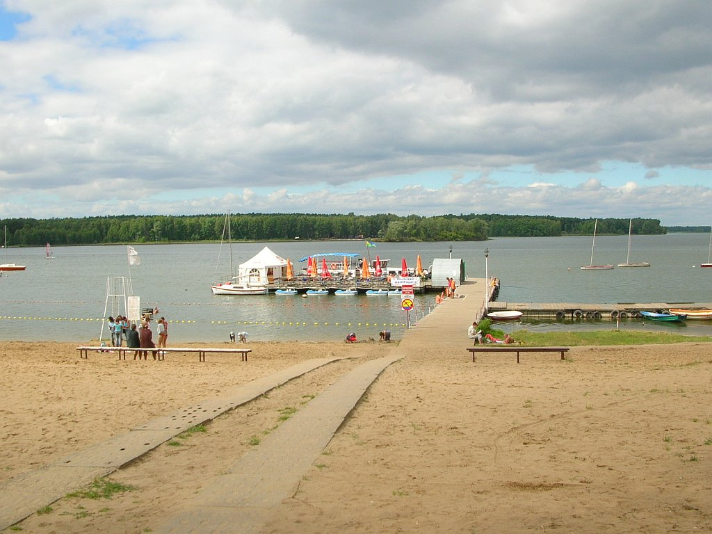 Zalew Koronowski